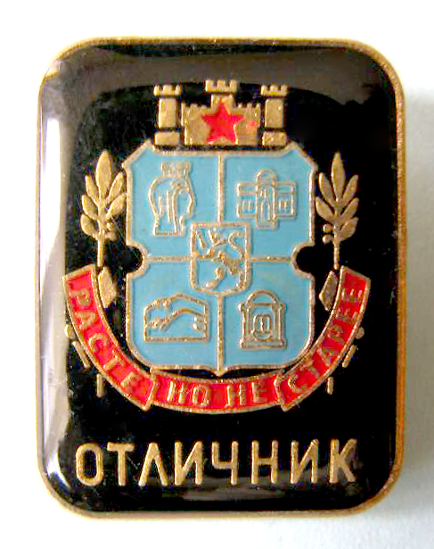 Abzeichen mit dem Stadtwappen von Sofia, in der Version die von 1974 bis 1991 galt (mit rotem Stern n der Mauerkrone)